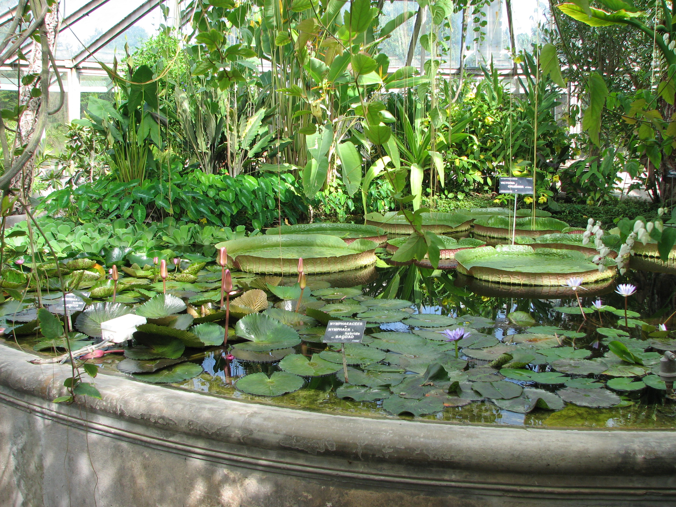 Serre Victoria dans le Parc de la Tête d'Or à Lyon (France)